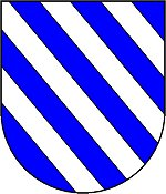 Brasão de Armas da Família Viegas